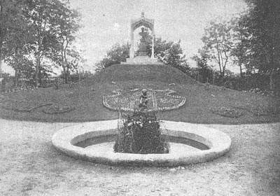 Монумент Олександру II, на станції Затишшя